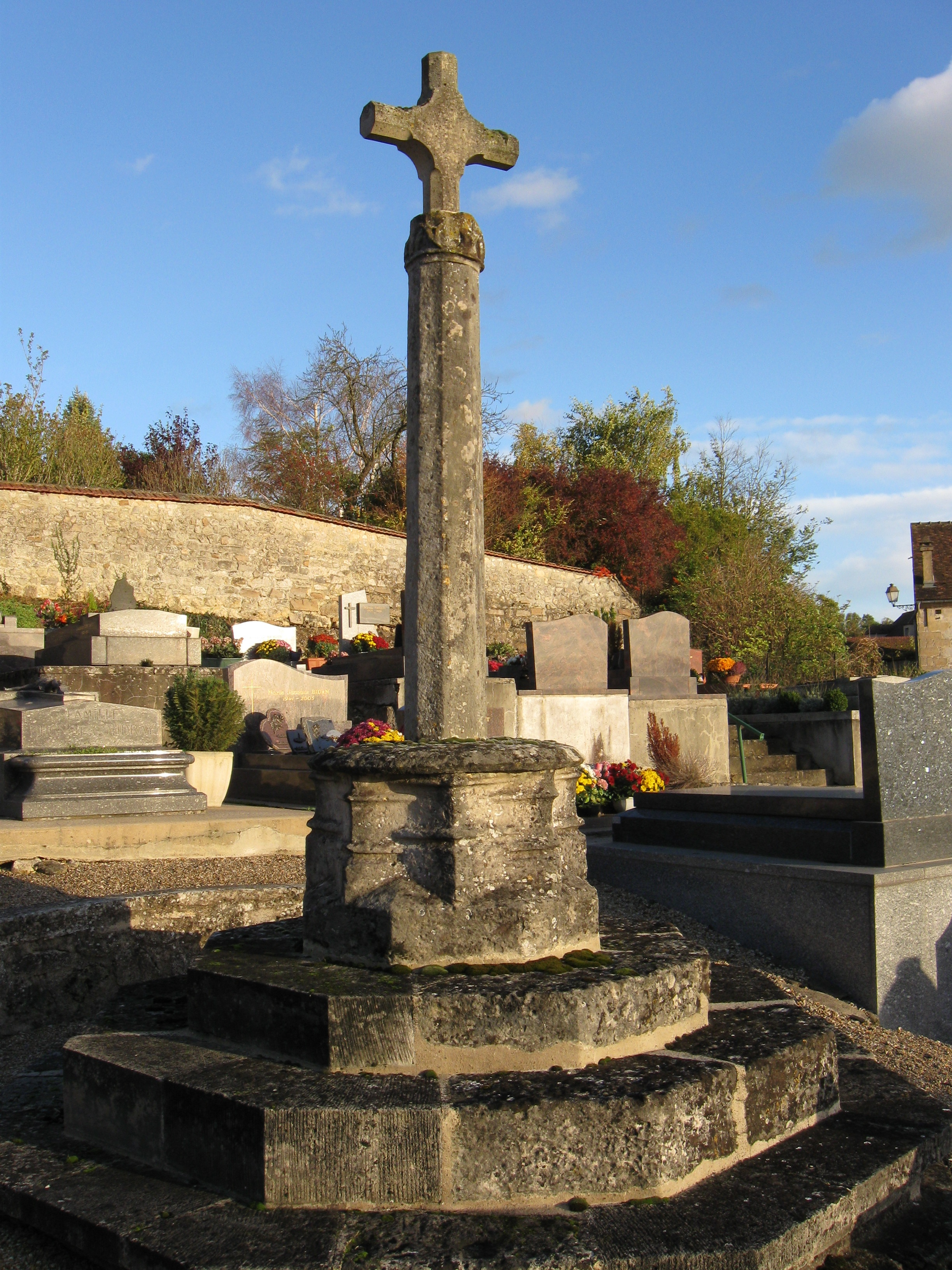 Croix de pierre dans le cimetière. (Santeuil, département du Val-d'Oise, région Île-de-France).